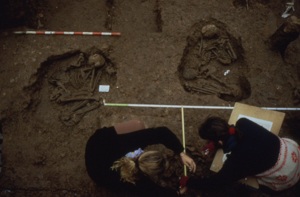 Jaciment Sant Pau del Camp 1990, Barcelona - Treballs al jaciment